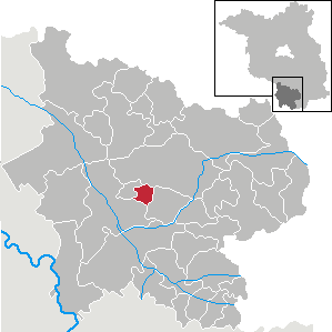 Tröbitz in Brandenburg (Country) - District Elbe-Elster